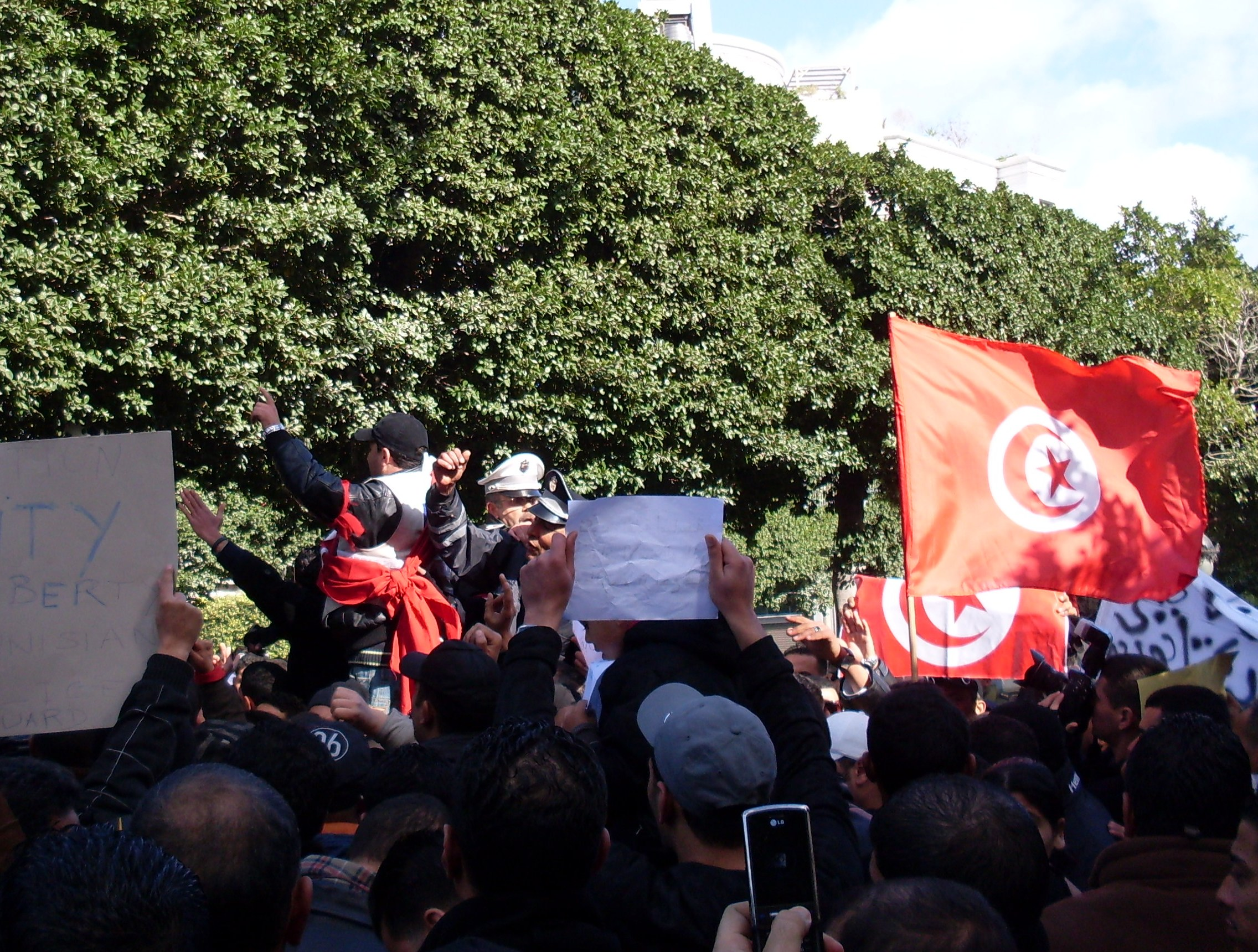 Manif des agents du ministère de l'intérieure lors de la révolution des Jasmins